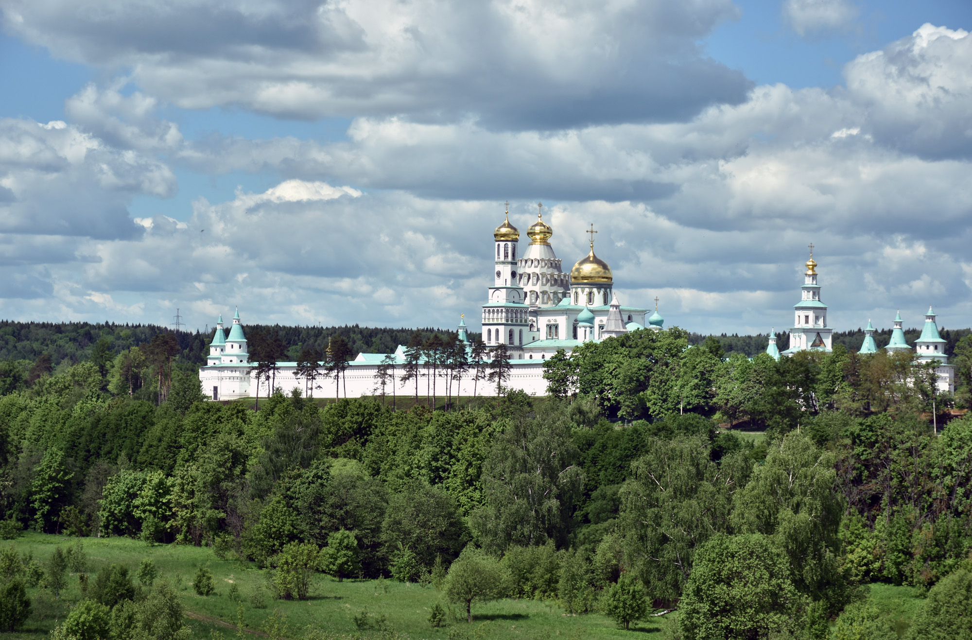 Ансамбль Ново-Иерусалимского (Воскресенского) монастыря: улица Советская, 2, Истра, Истринский район, Московская область